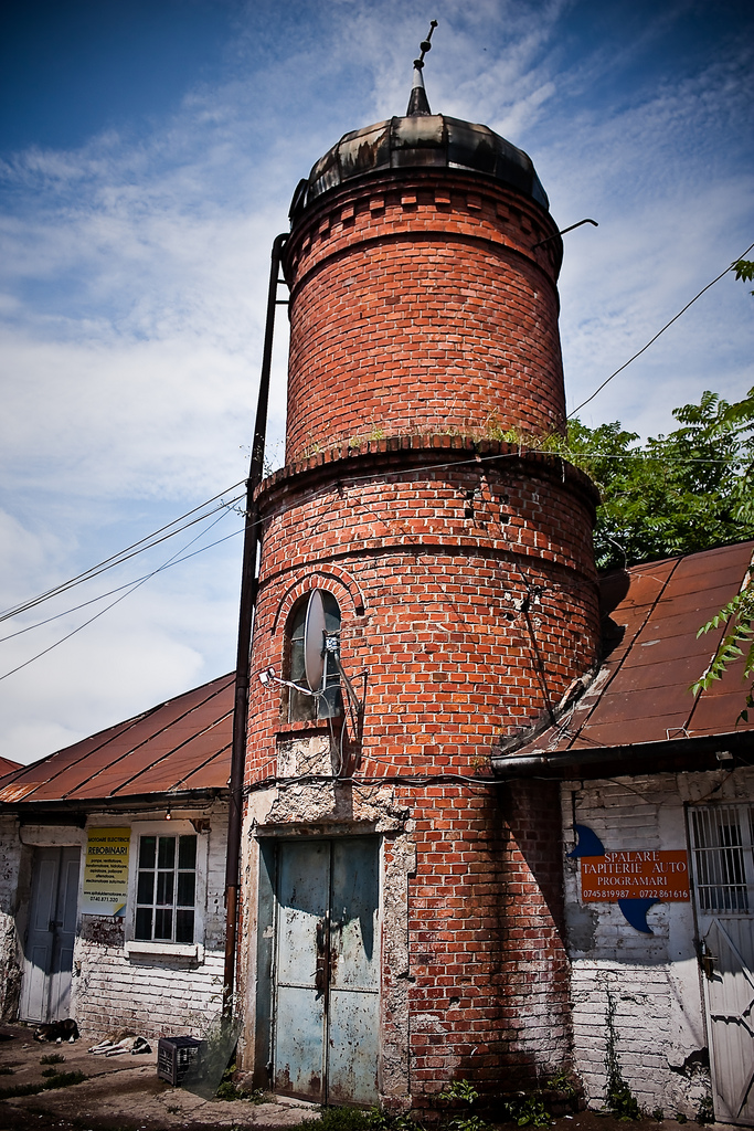 conacul cantacuzino dudesti cioplea